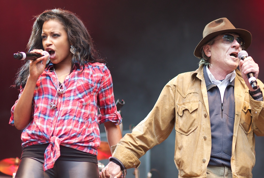 Fabienne Louves & Polo Hofer („Auftritt am Open Air Hoch-Ybrig zusammen mit Polo Hofer und der legendären Schmetterband am 18. Juni 2011“ gem.